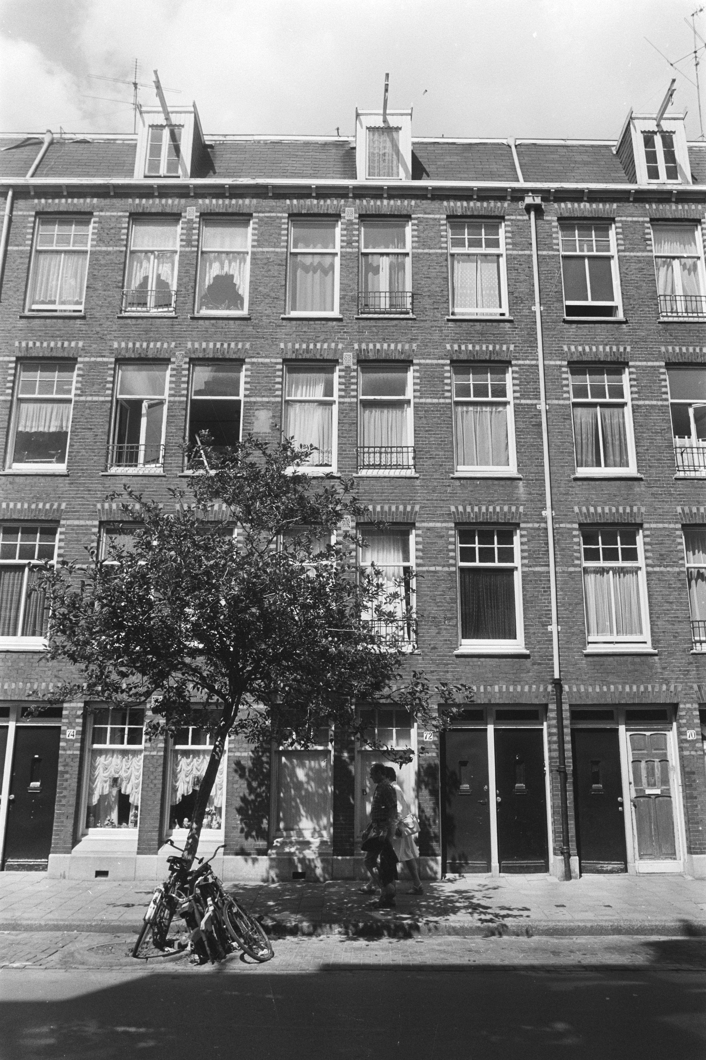 Collectie / Archief : Fotocollectie Anefo Reportage / Serie : [ onbekend ] Beschrijving : Kraakwoning van Alan Reeve de man die een agent schoot ( Van Boetzelaerstraat ) Datum : 10 augustus 1982 Trefwoorden : kraakpanden Fotograaf : Bogaerts, Rob / Anefo Auteursrechthebbende : Nationaal Archief Materiaalsoort : Negatief (zwart/wit) Nummer archiefinventaris : bekijk toegang 2.24.01.05 Bestanddeelnummer : 932-2704